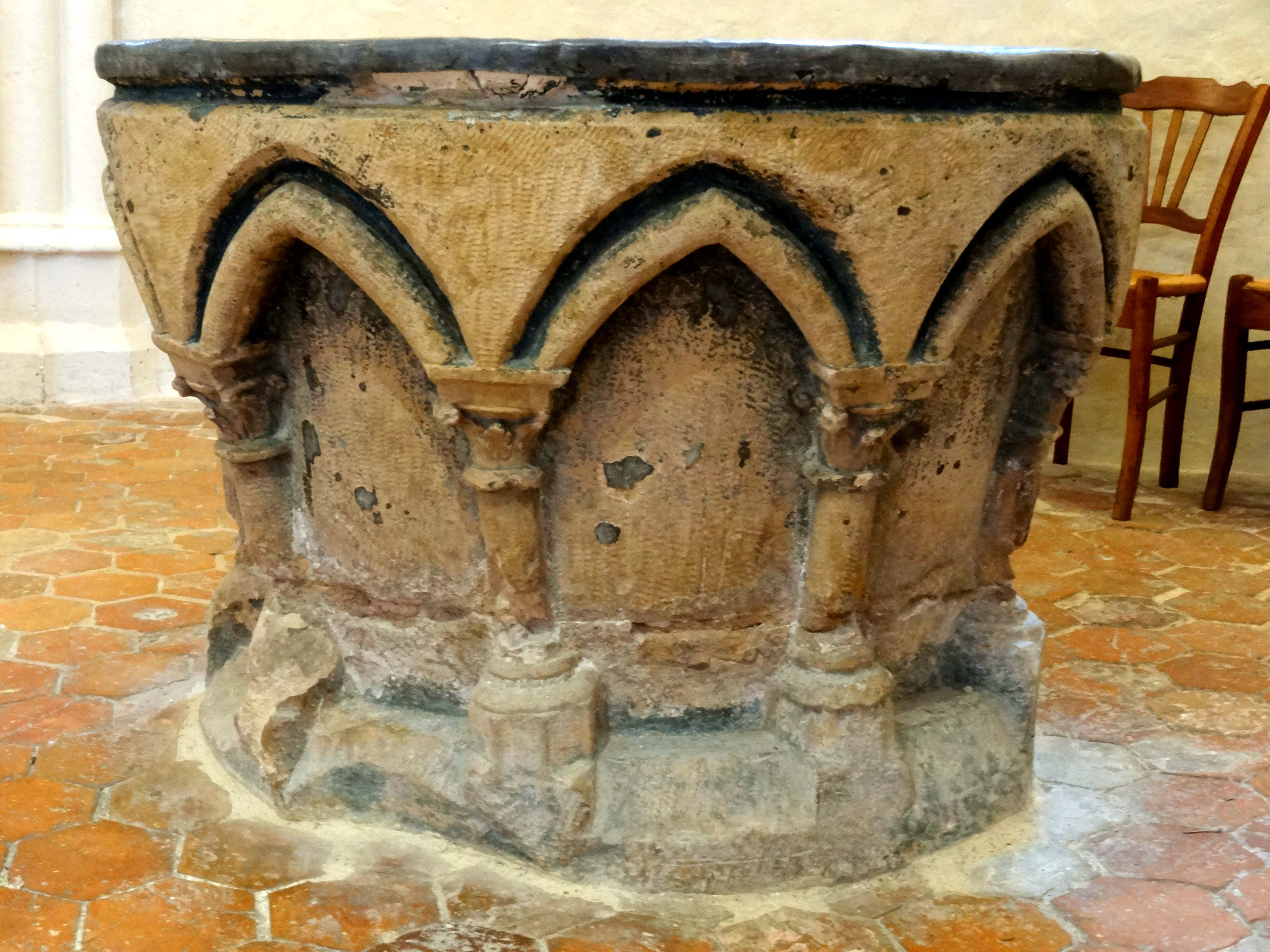 Mobilier de l'église - voir titre.